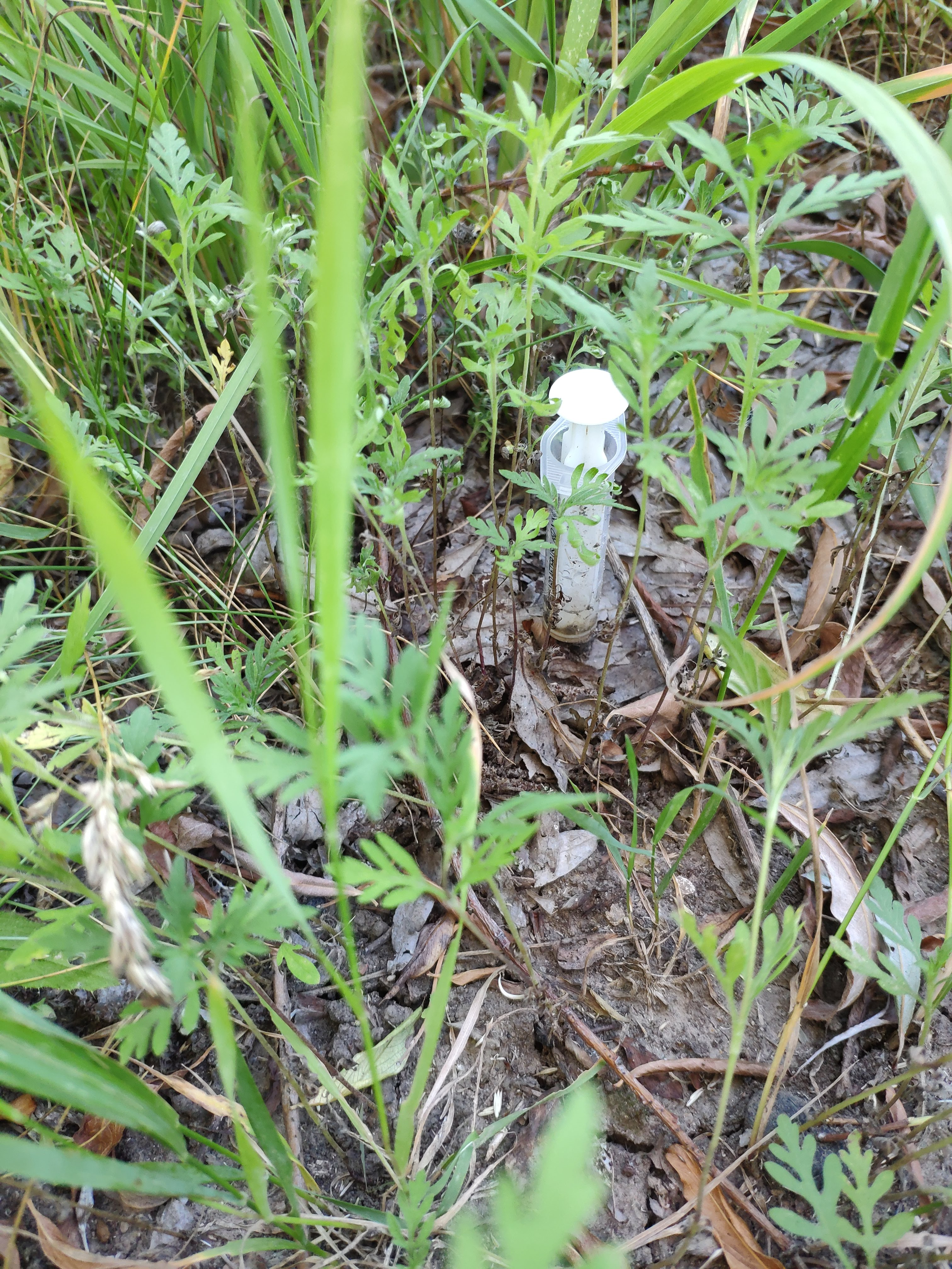 Артсклади